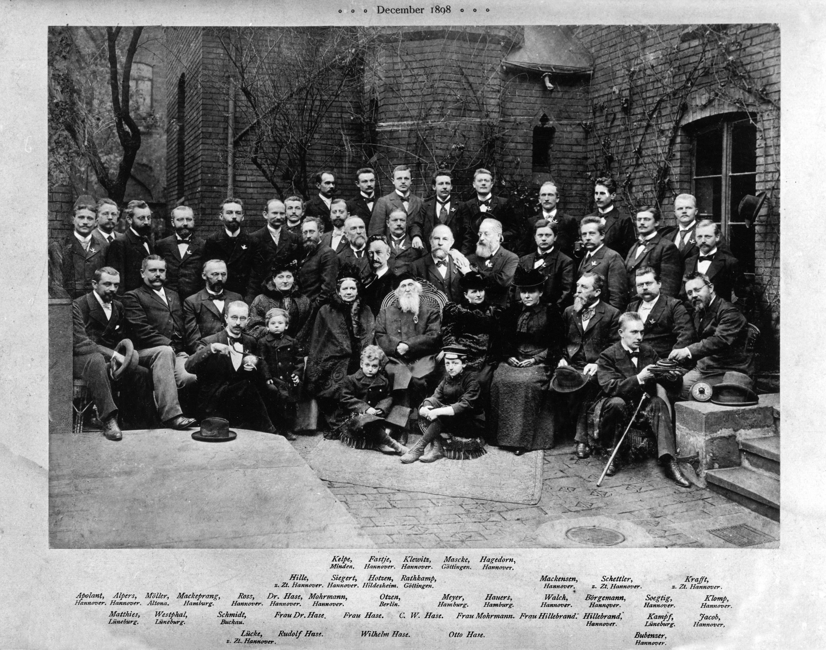 Gruppenbild zur Feier des 80. Geburtstags von Conrad Wilhelm Hase, im Kreise seiner Familie und ehemaligen Schülern, Dezember 1898. Das Bild ist von links nach rechts mit den Namen und Orten folgender Personen untertitel: Erich Apolant (Hannover); ...